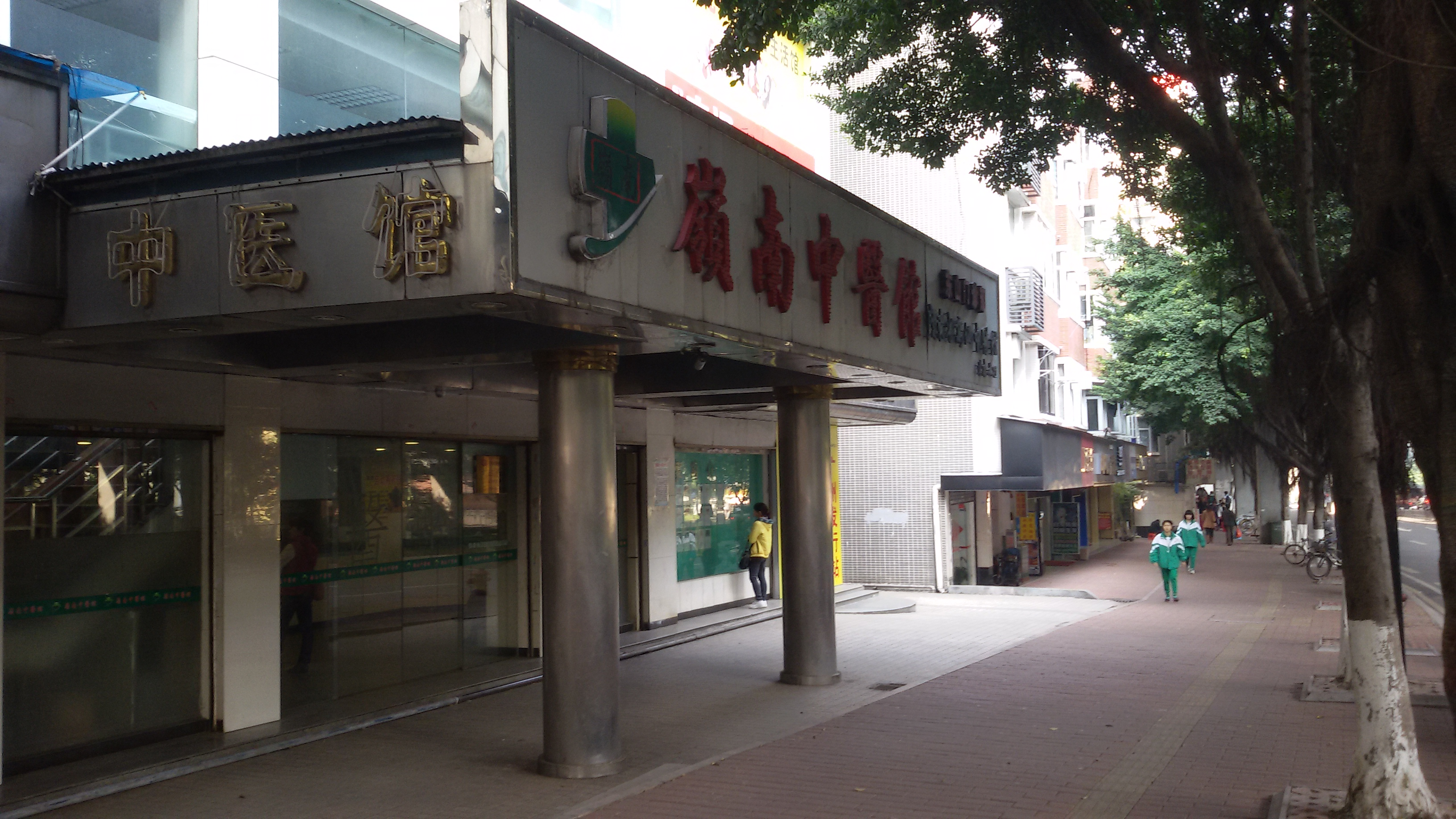 粵語: 嶺南中醫館嘅東山門診部